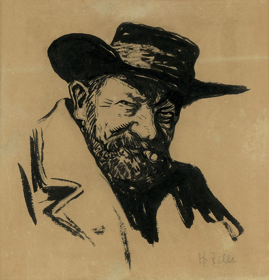 Heinrich Zille: "Selbstbildnis Heinrich Zille", Pinsel über Bleistift auf Velin, 20 x 22,6 cm, signiert, betitelt und bez. "No 224". Provenienz: Nachlass Otto Nagel.